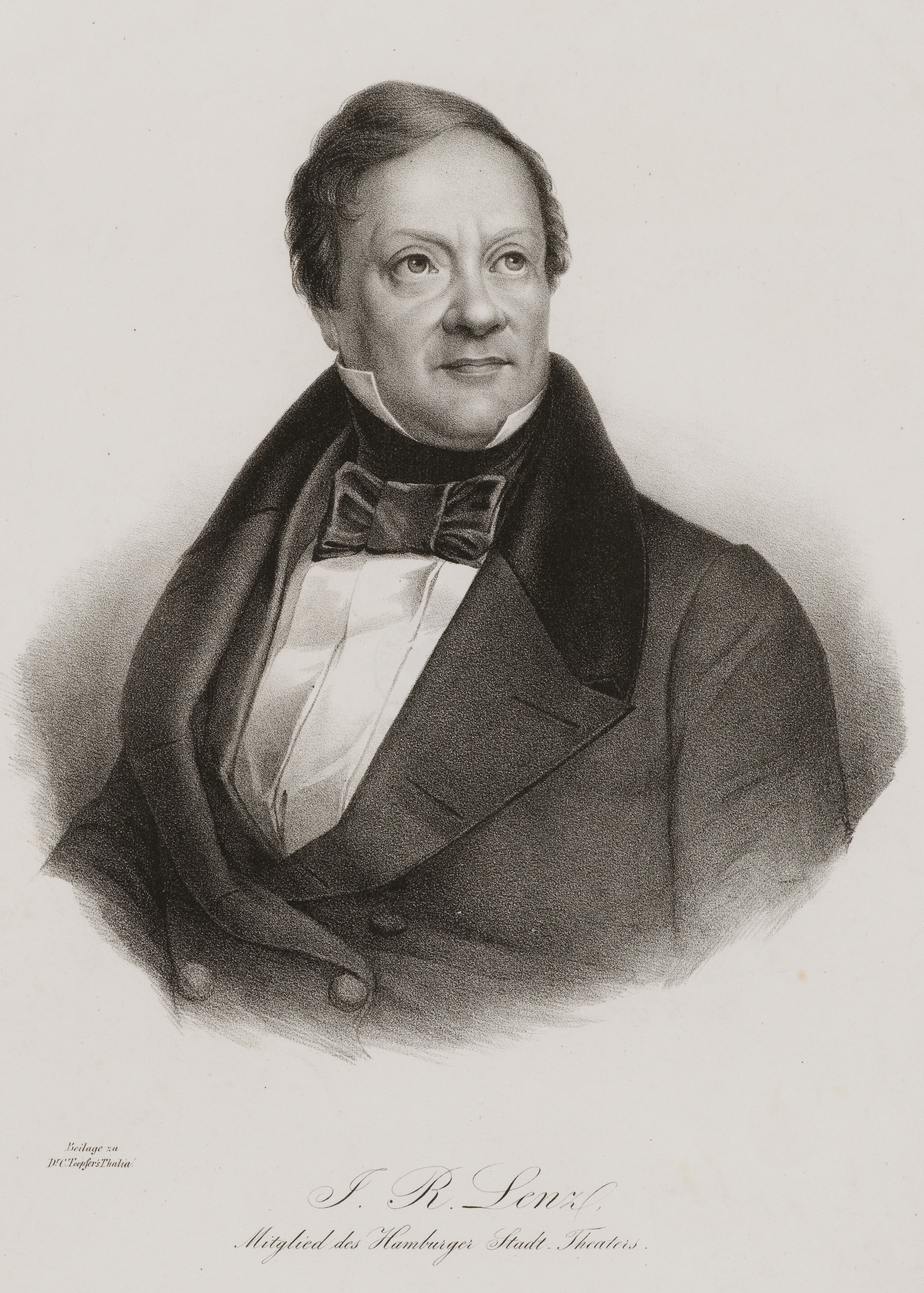 J. R. Lenz, Mitglied des Hamburger Stadt-Theaters